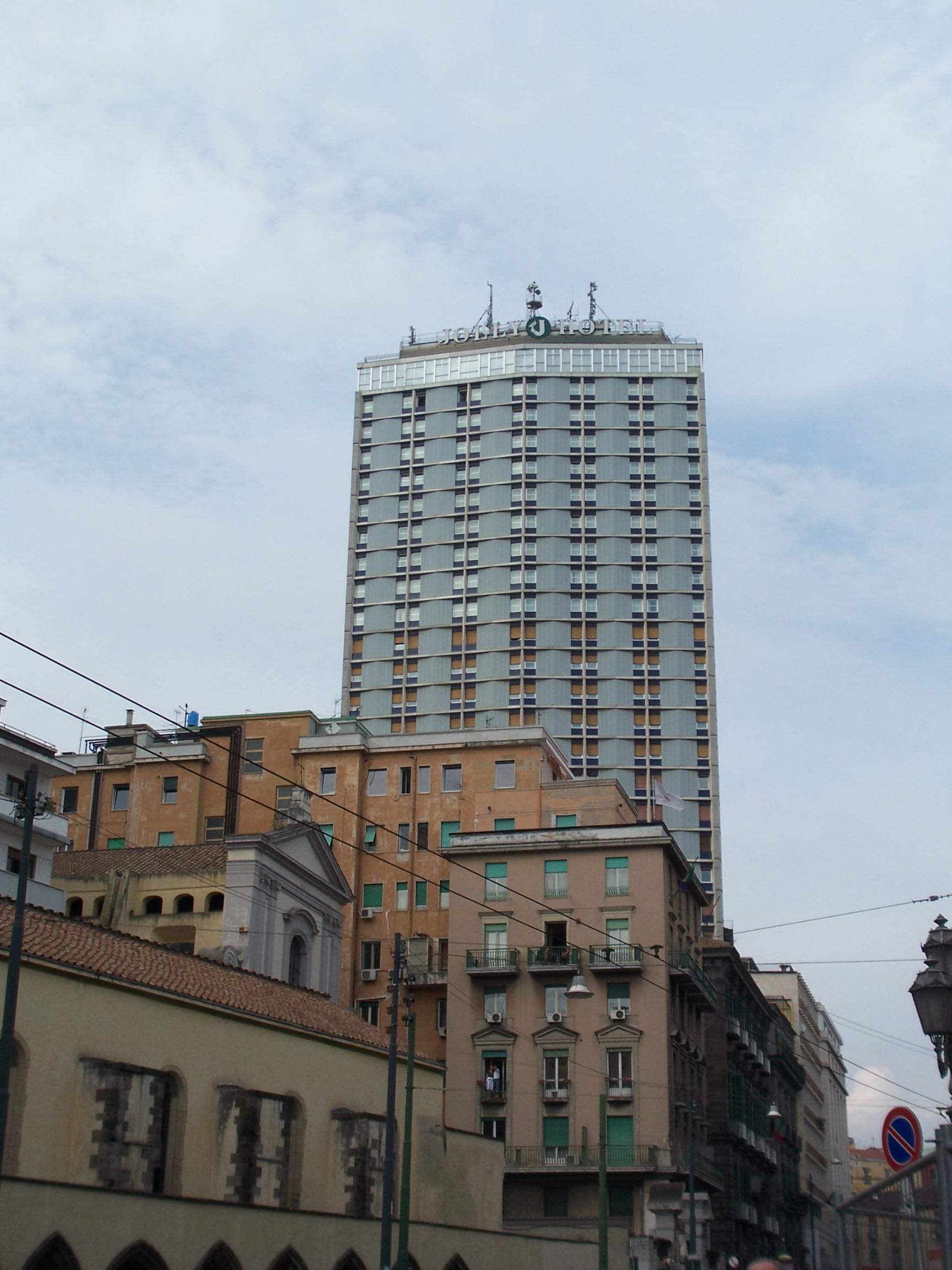 Ambassador's Palace Hotel - Via Medina